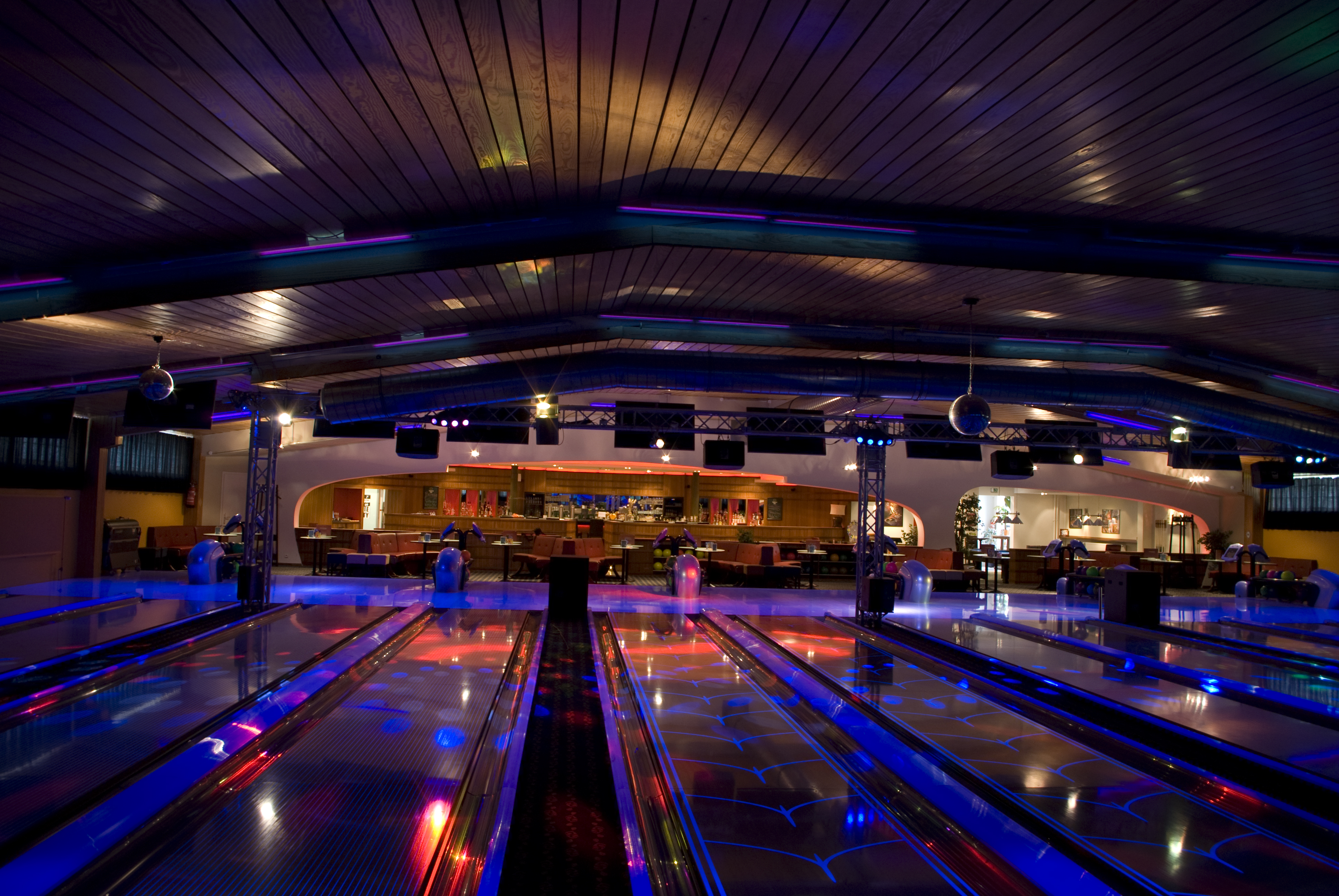 Cosmic Bowling in Norderstedt